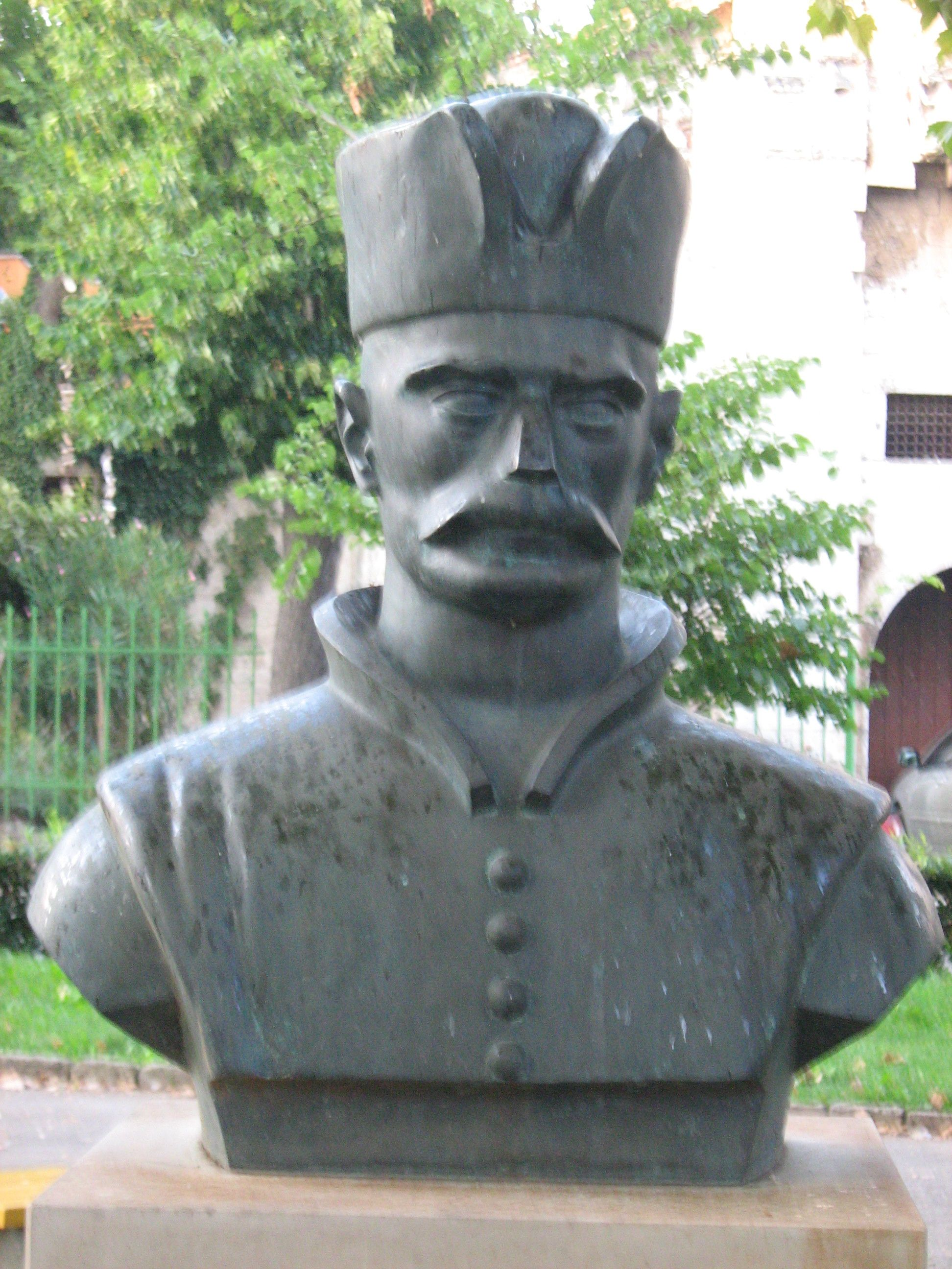 Brne Karnautić